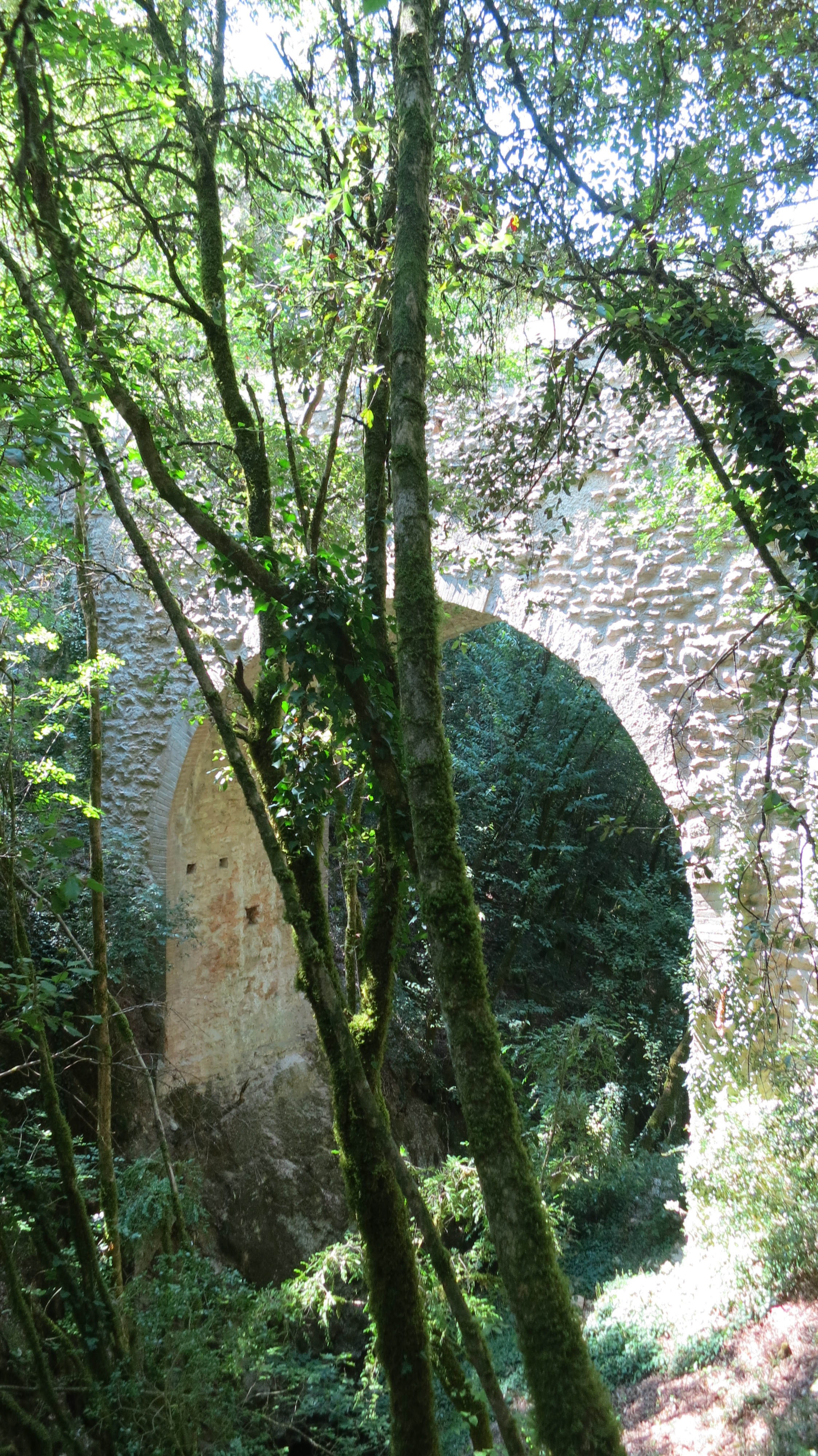 Ponte Sanguineto - Giro dei Condotti